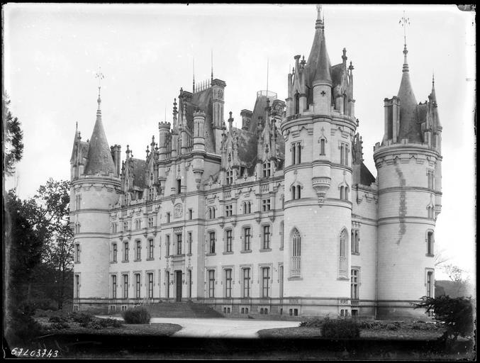 Château de Challain, Maine-et-Loire, France, par Gustave William Lemaire.